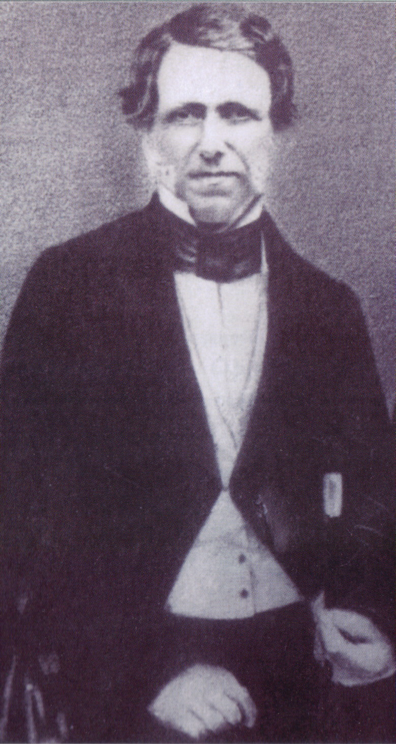 Retrato de Bernardo Berro (1803 - 1868), 7º Presidente Constitucional Uruguayo